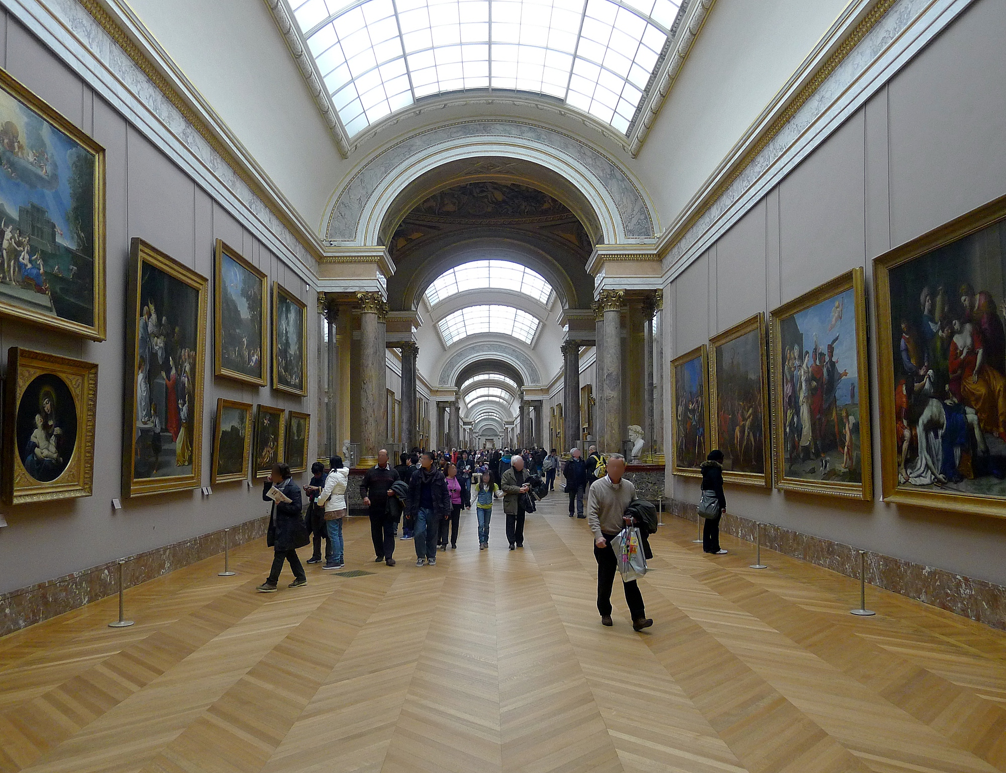 Salle du musée du Louvre